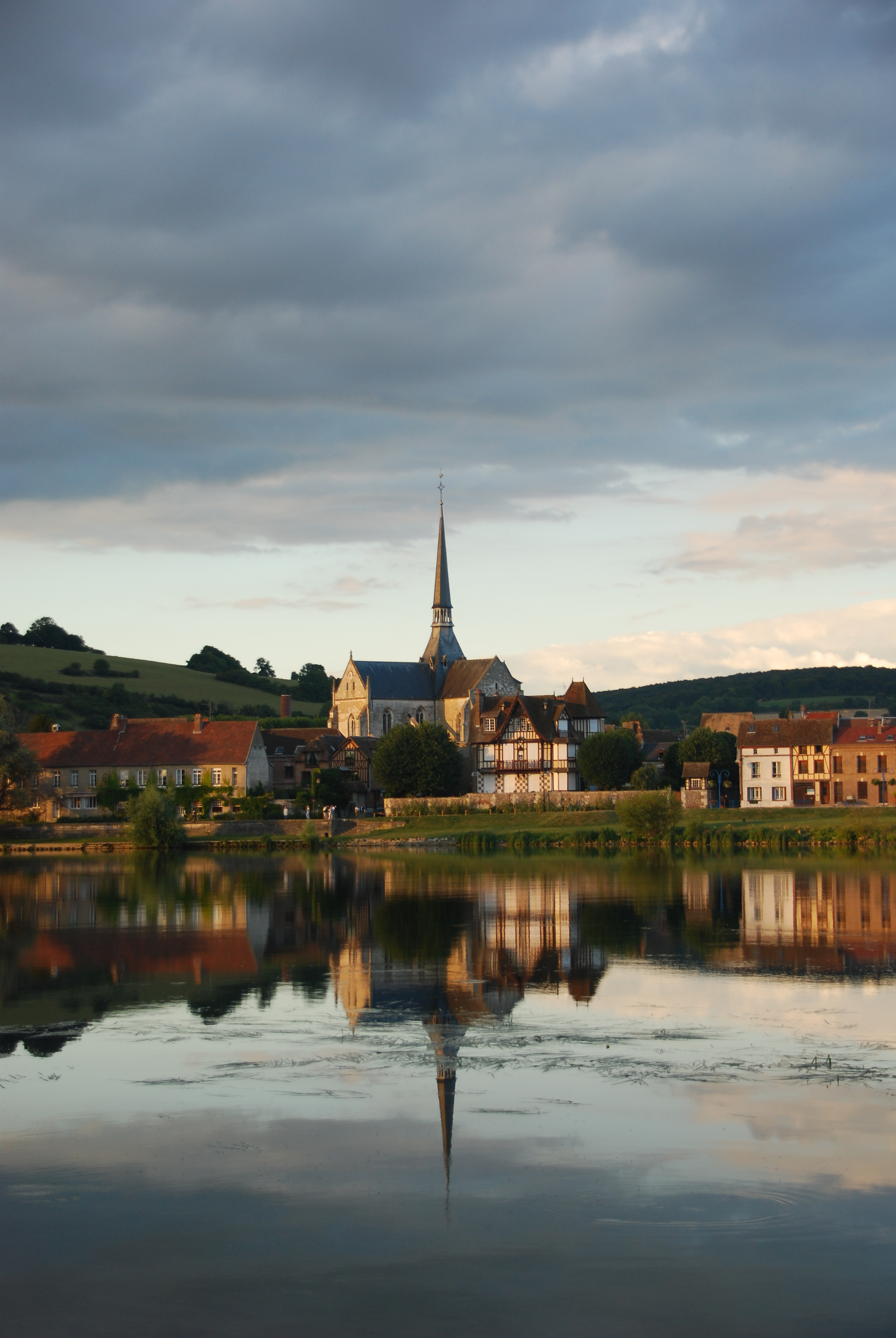 Les Andelys, France Les Andelys - Église Saint-Sauveur du Petit-Andely